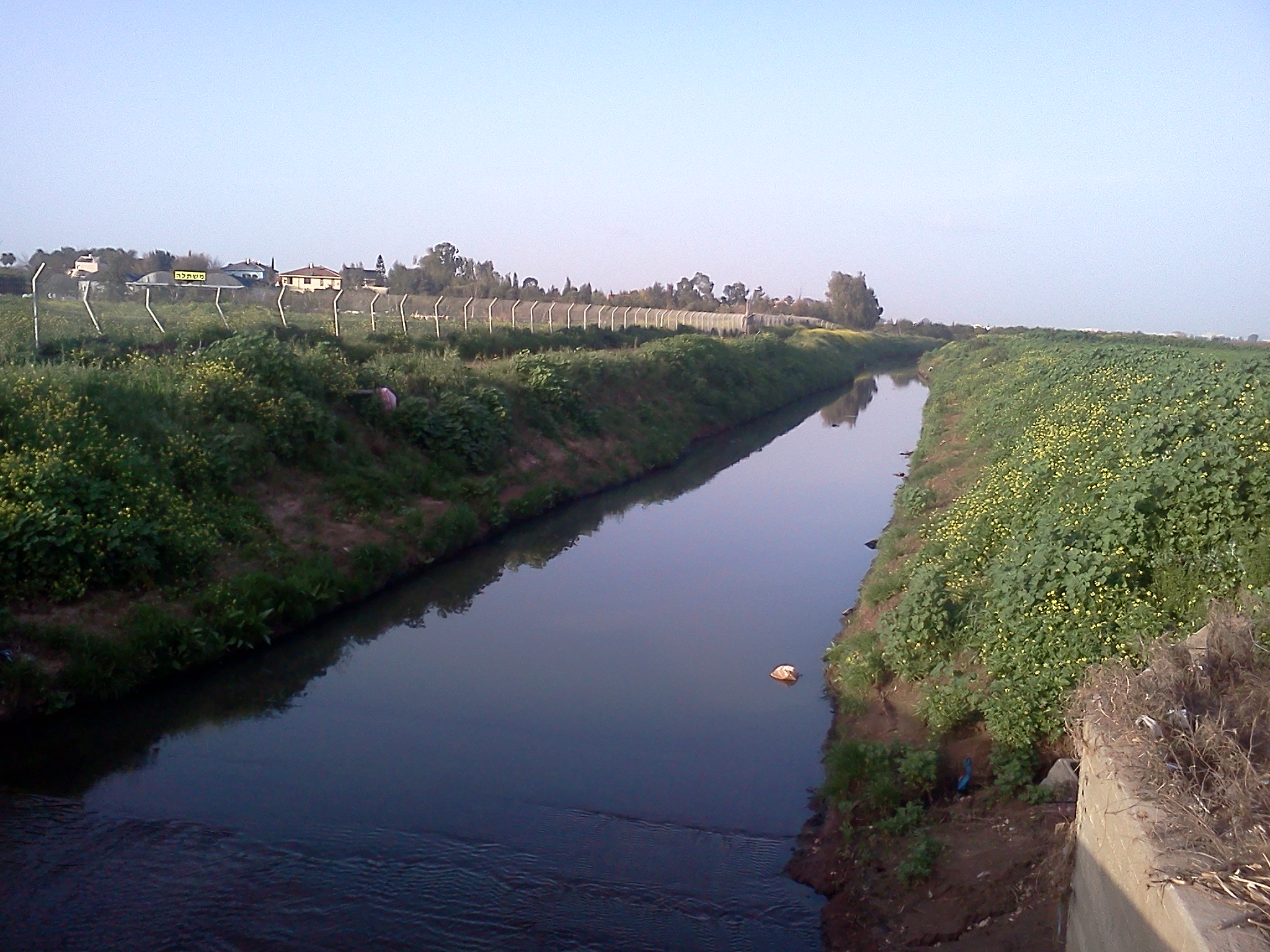 חלקו התחתון של נחל קנה בתקופת החורף